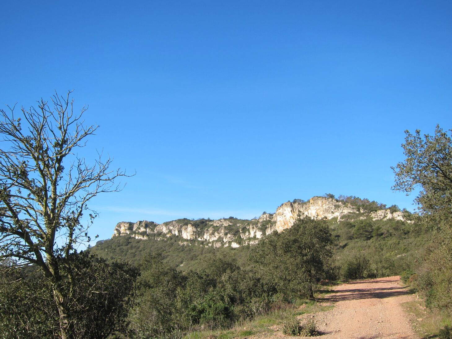 Tossal Gros de Miramar